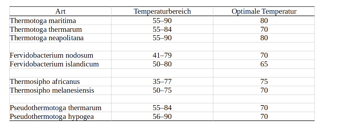 Eine Tabelle mit Angaben der tolerierten Temperaturbereichen und der Temperatur für optimales Wachstum einiger Arten der Thermotogales. Daten von: The Archaea and the deeply branching and phototrophic Bacteria